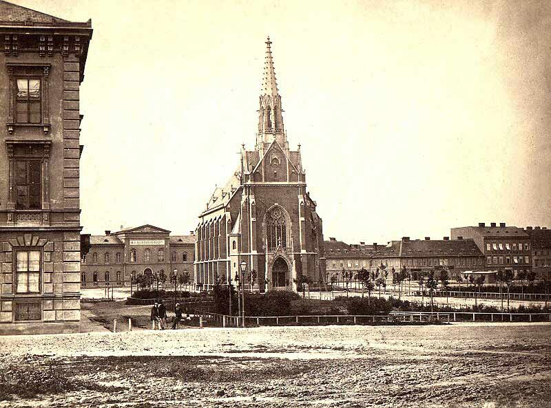 Archivní foto Červeného kostela v Brně (1867).